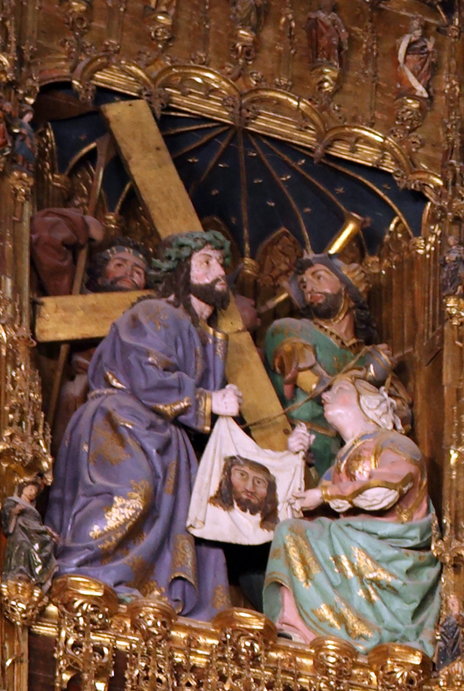 Camino del Calvario, detalle del retablo mayor de la catedral de Toledo (España)